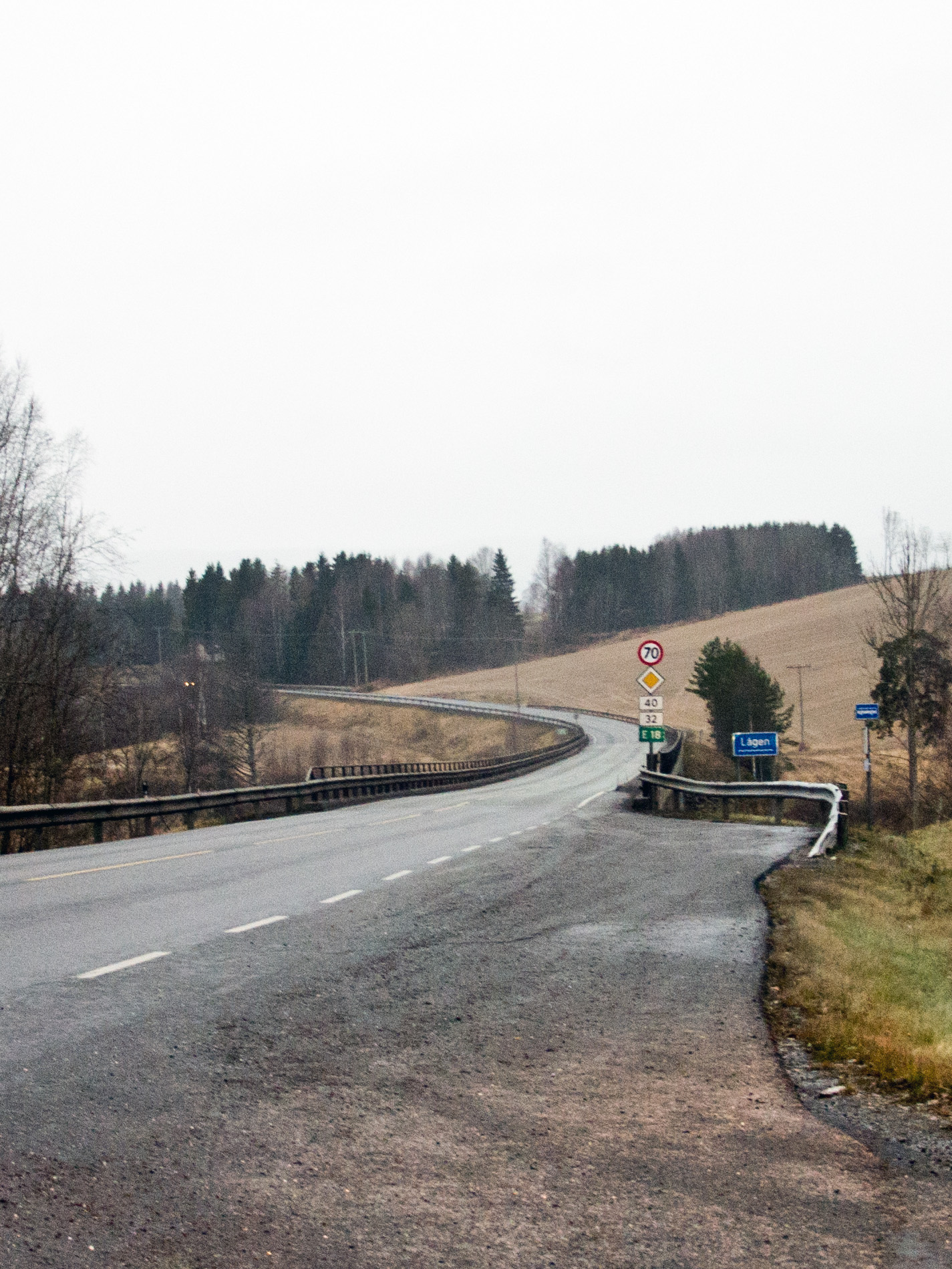 Fylkesvei 32 og 40 over Søndre Brufoss bru, i Lardal, Vestfold